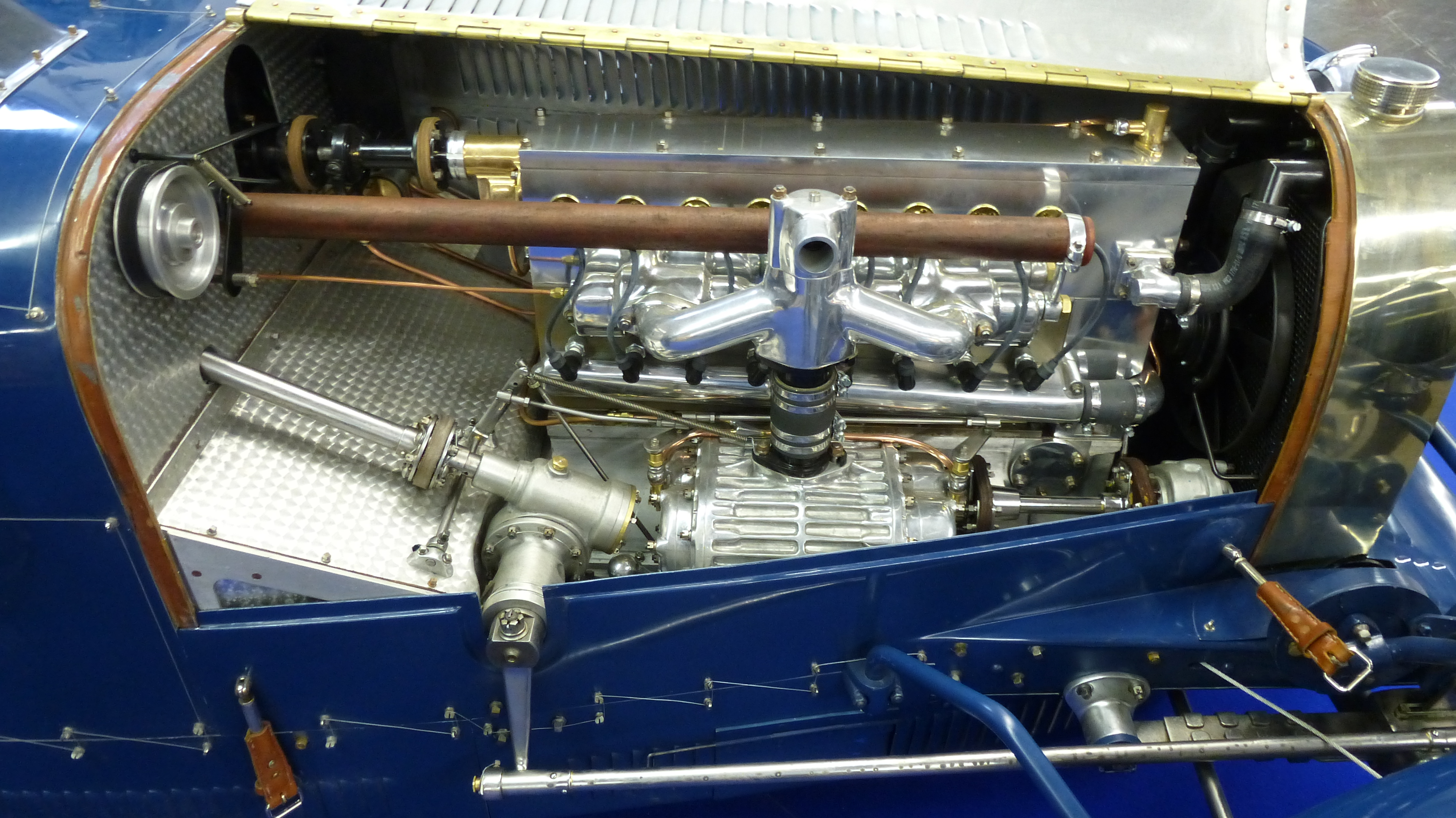 Pur Sang Bugatti 35 B Roadster Motor